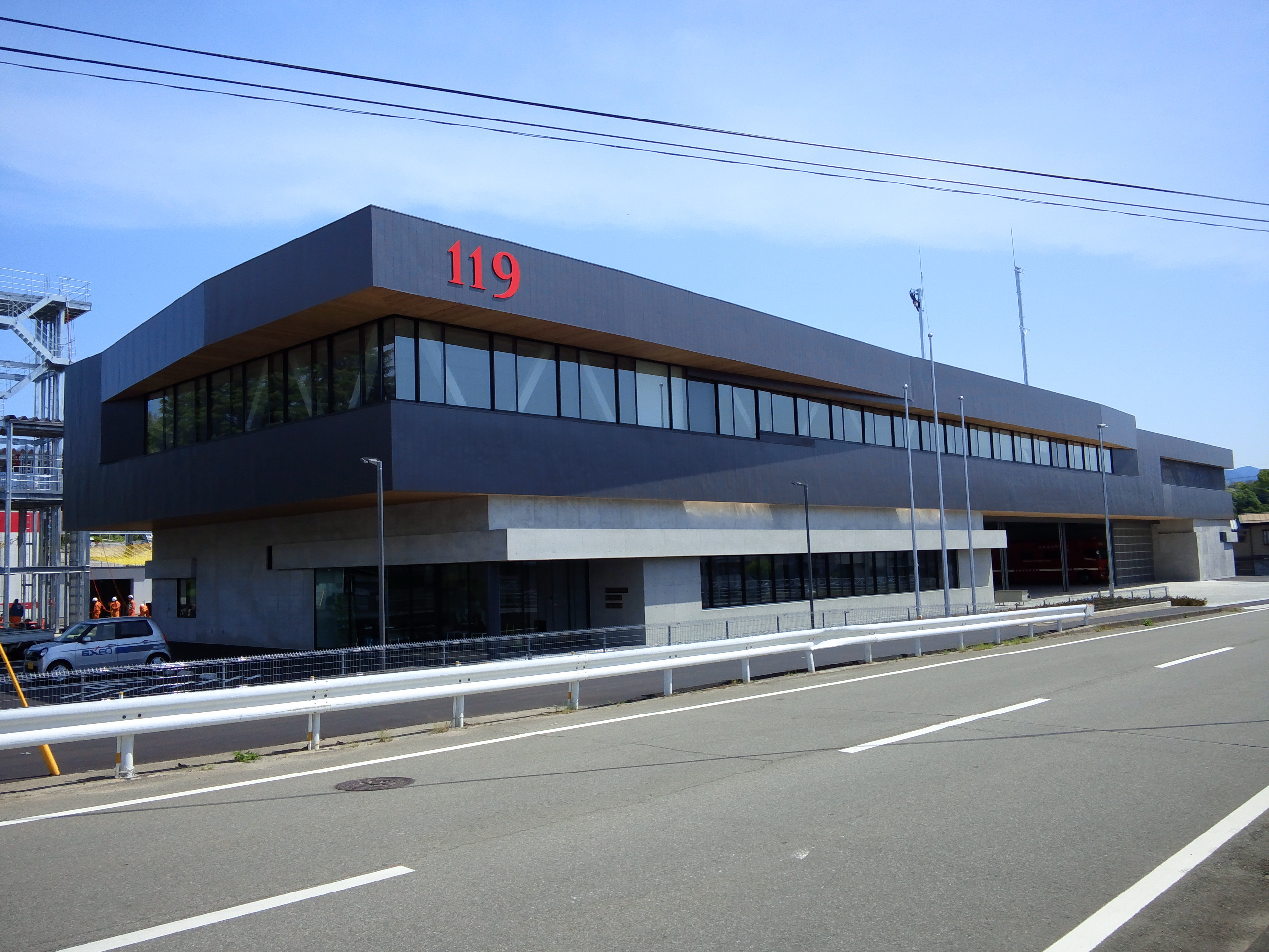 峡北消防本部・韮崎消防署庁舎